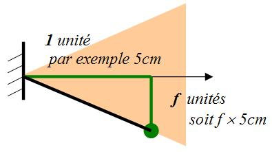 méthode graphique rapide pour le tracer du cone de frottement